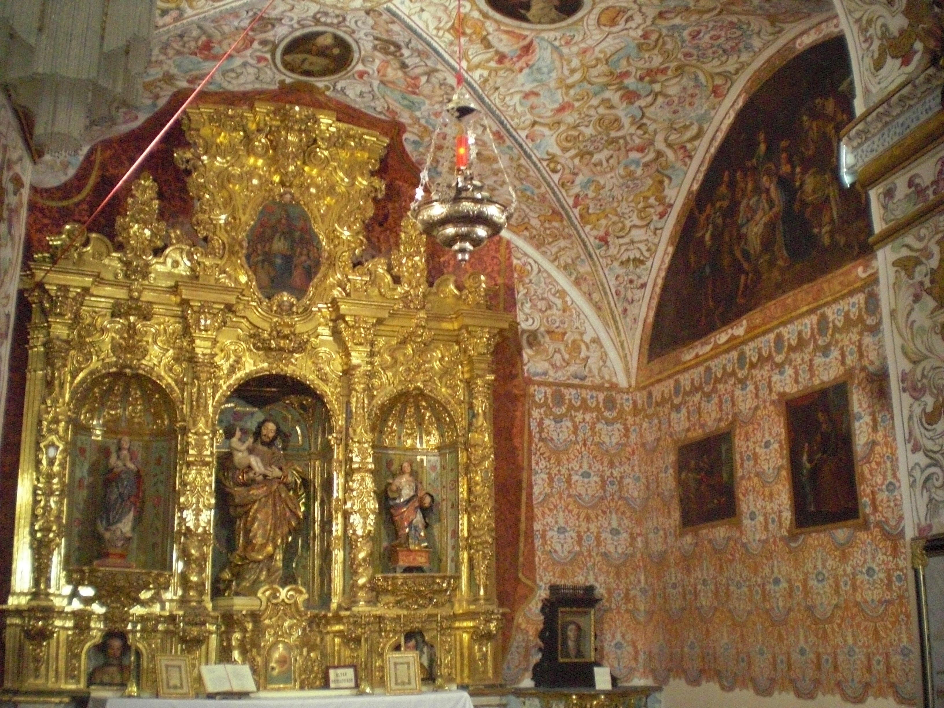 Baroka interno de preĝejo Carmen